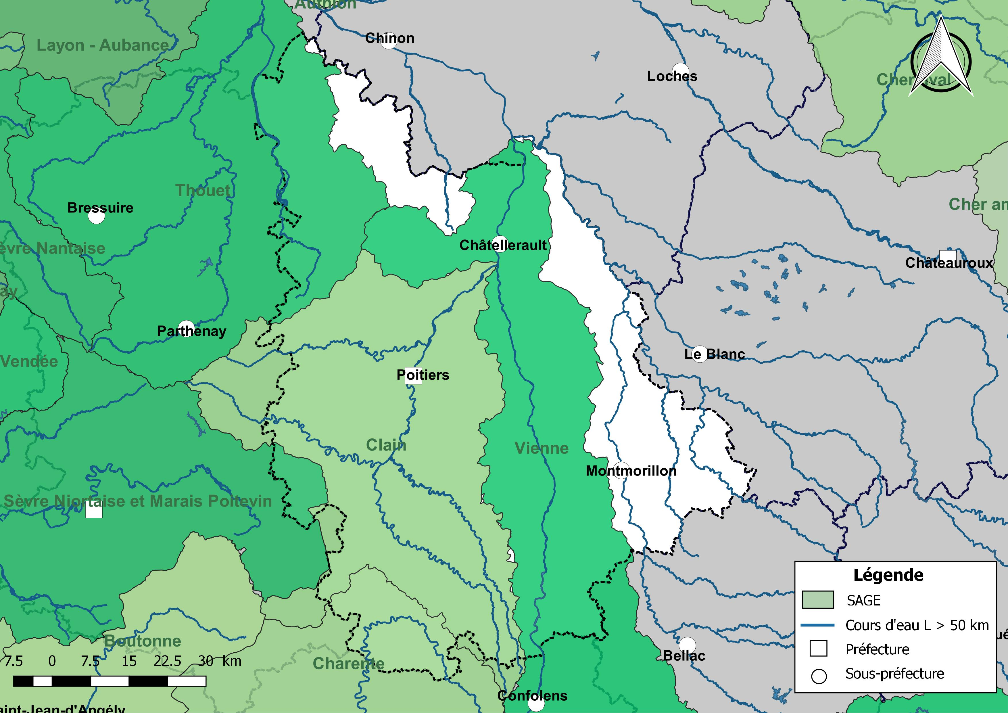 Carte des schémas d'aménagement et de gestion des eaux (SAGE) concernant le département de la Vienne (France) au 1er janvier 2018.